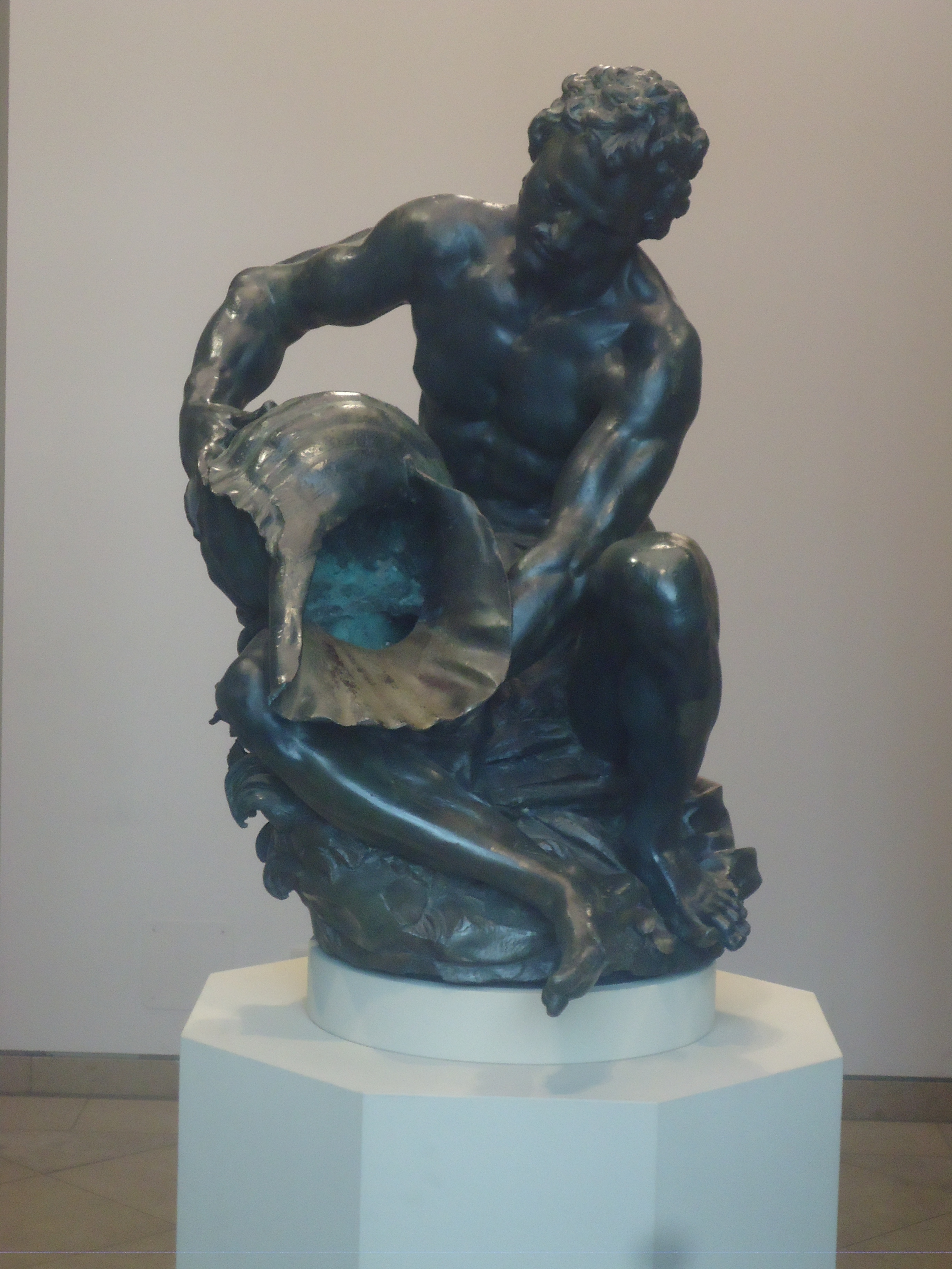 Brunnenjüngling Maximilianmuseum